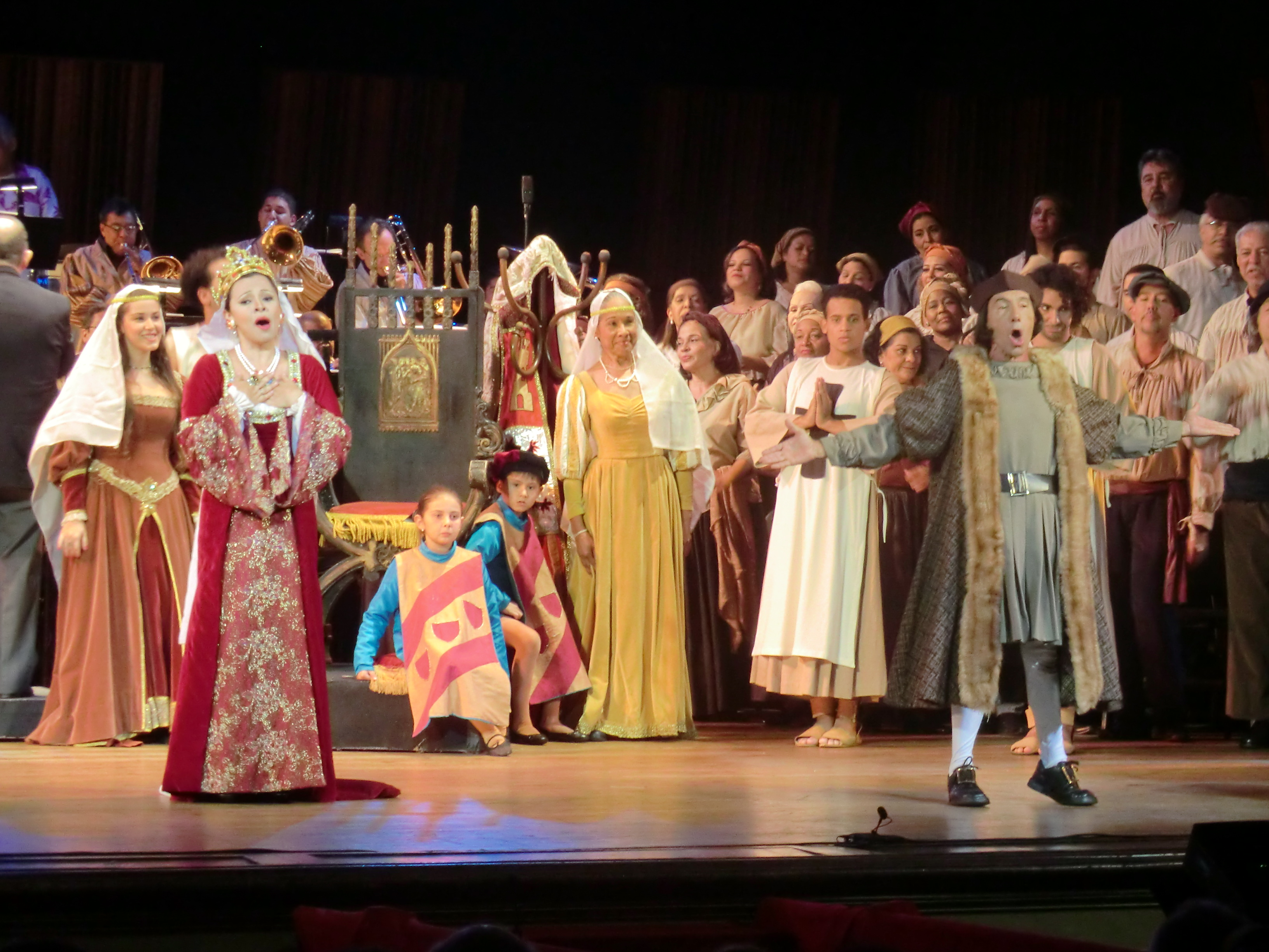 Los Martirios de Colón, ópera bufa con texto de Aquiles Nazoa y música de Federico Ruiz. Teatro Municipal de Caracas, 2013.